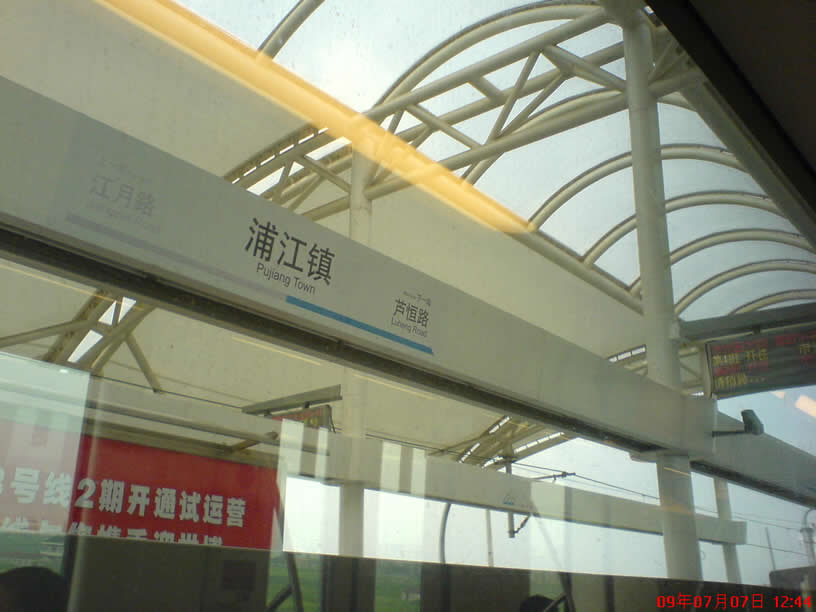 浦江镇站站台